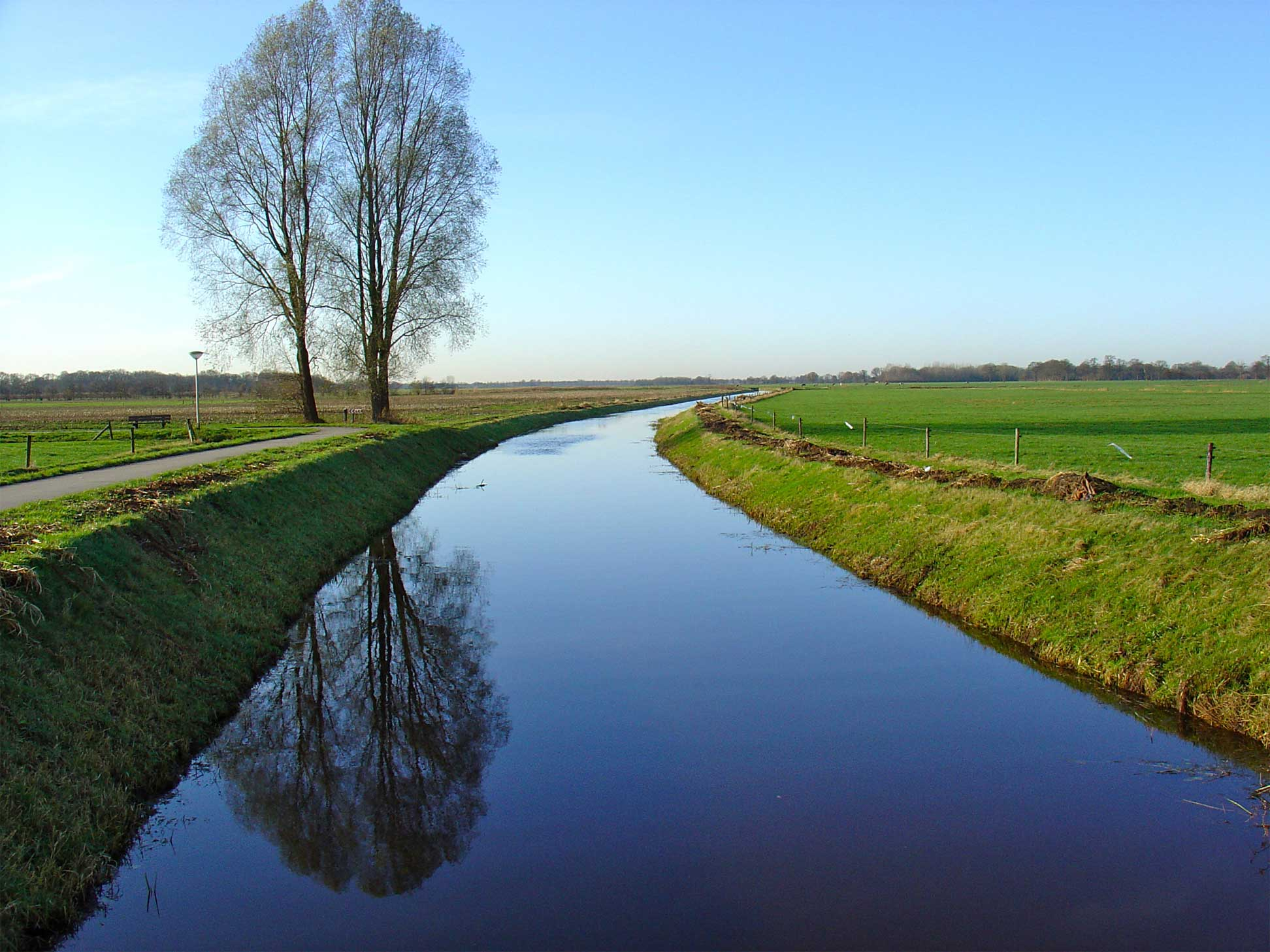 De Ruiner Aa, een bovenloop van de Wold Aa